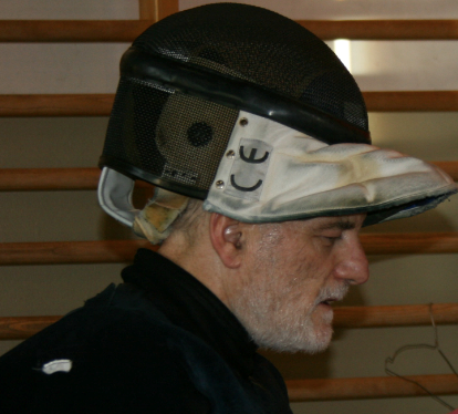 Guy Evéquoz